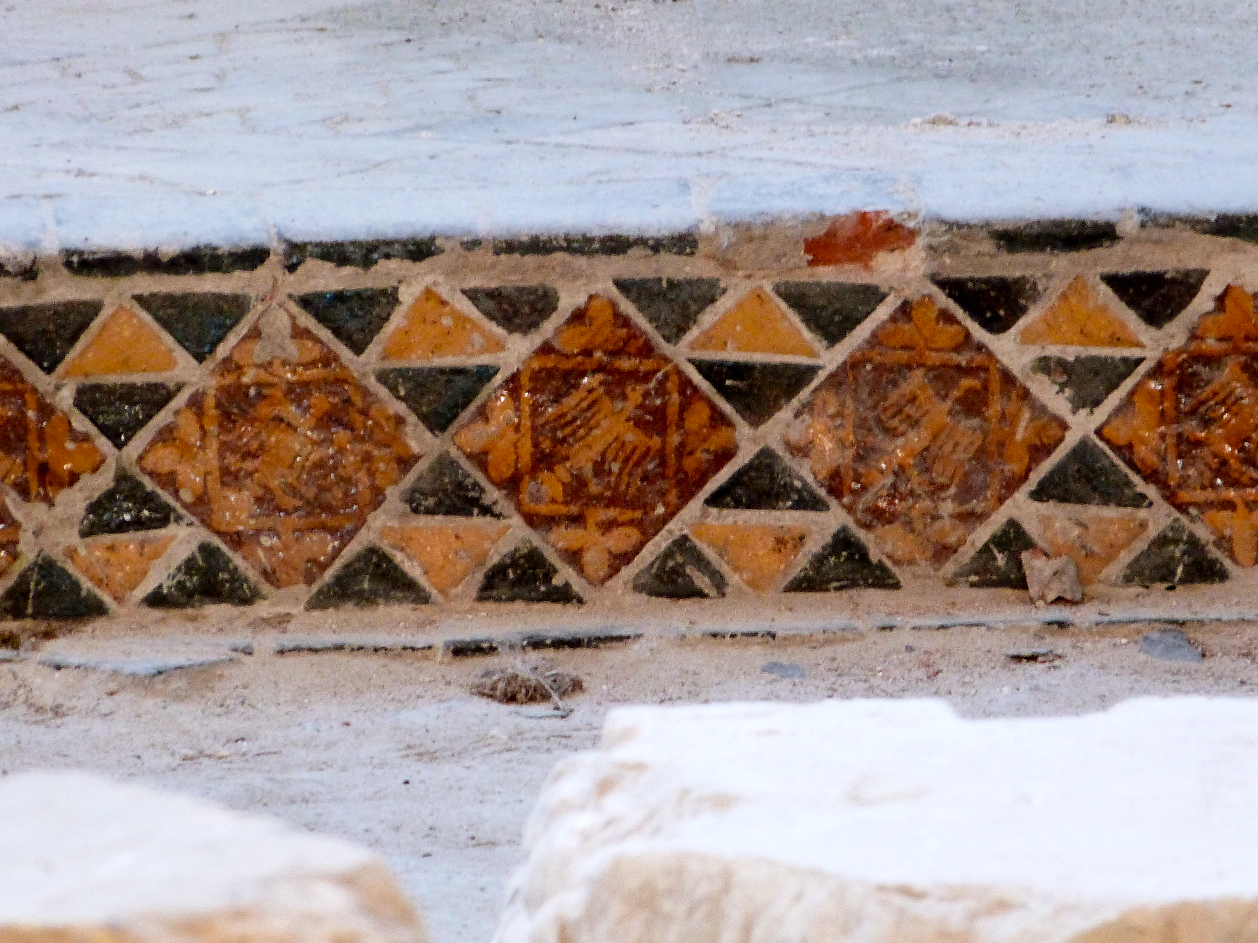 Sainte-Radegonde (Tours, Indre-et-Loire, France), ancienne abbaye de Marmoutier.